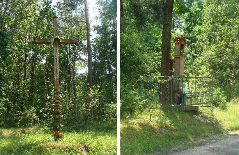 Kapliczka w Augustówce